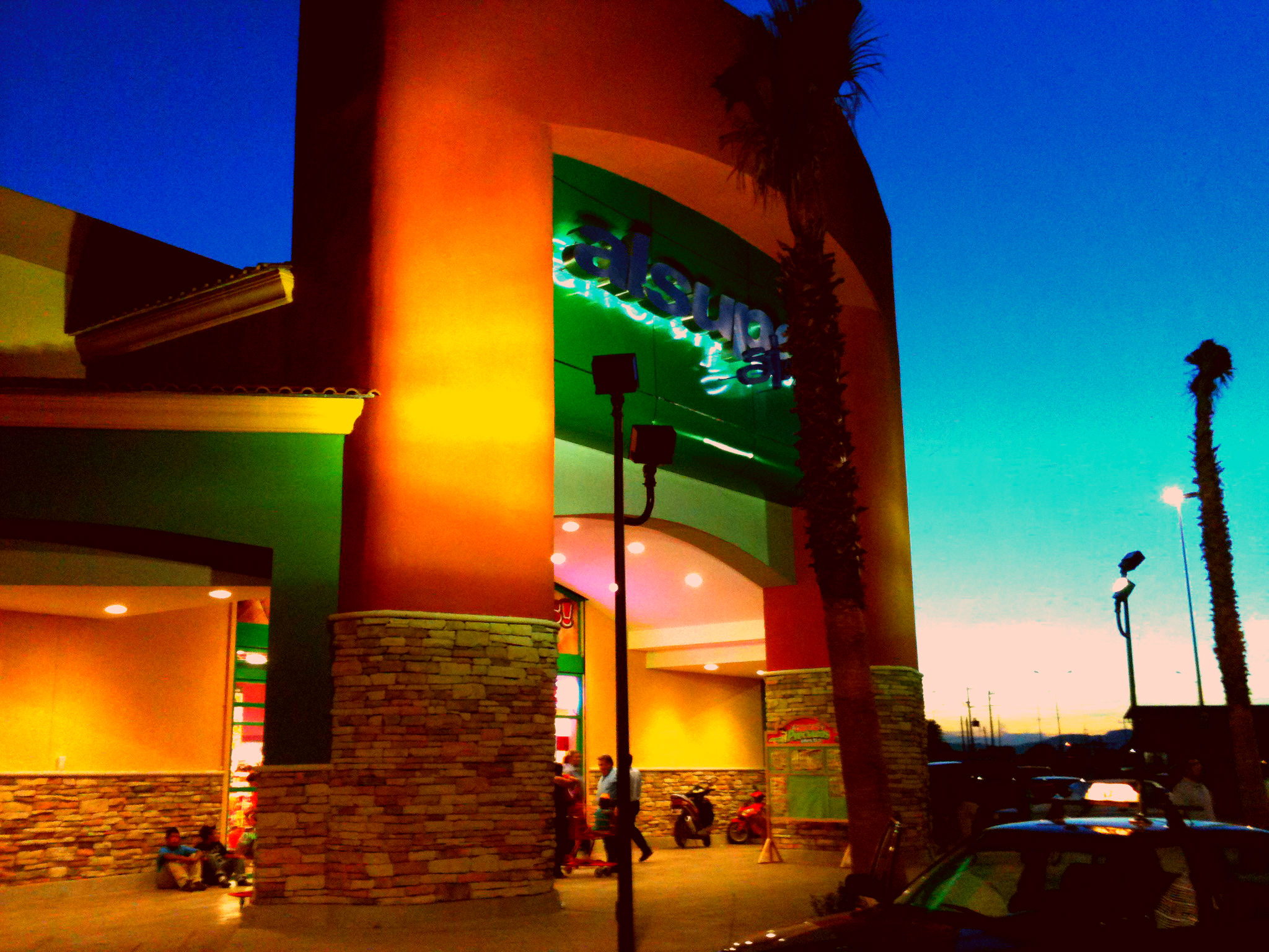 Alsuper Store Tres Culturas Cuauhtemoc Chihuahua